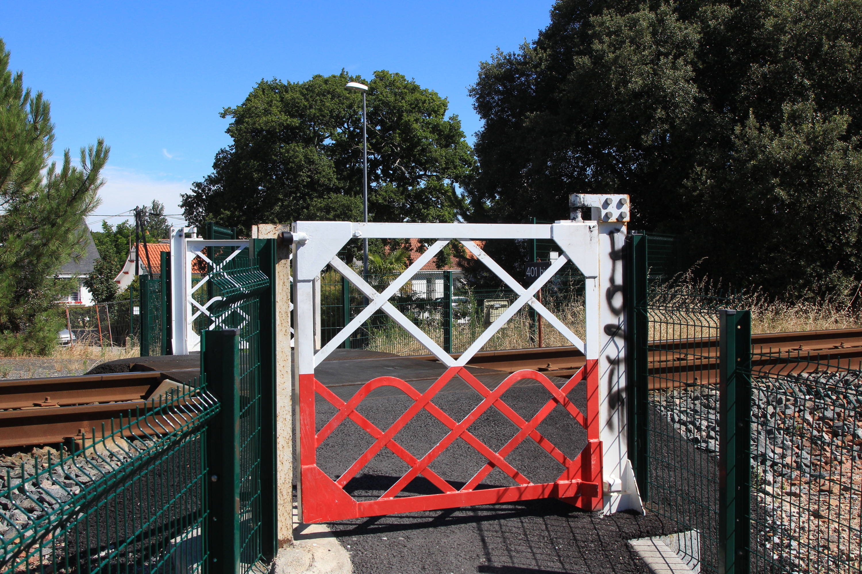 Barrières du PN pour piétons n°401 bis, à proximité immédiate de la gare de La Baule-Escoublac.